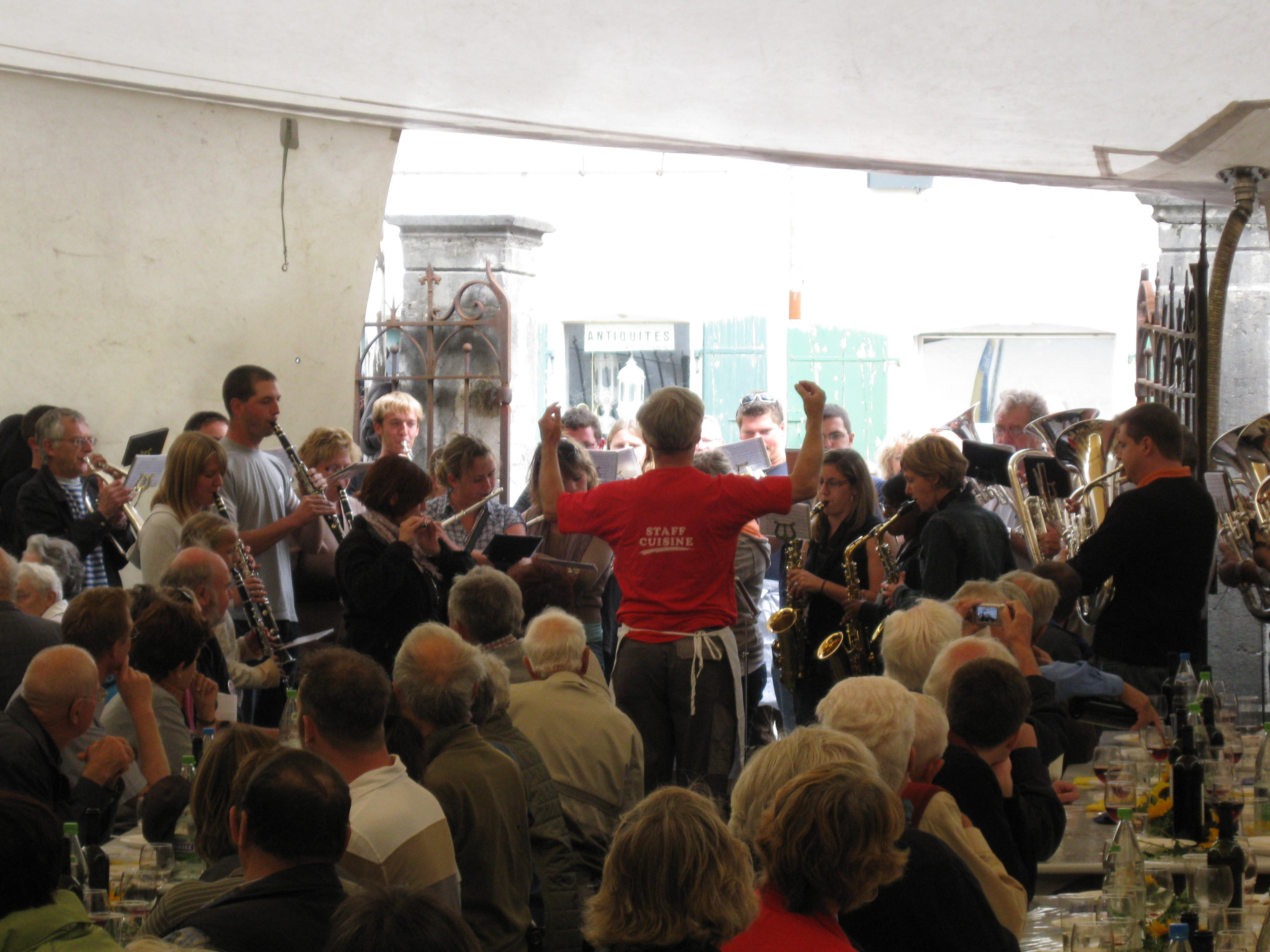 Musikgesellschaft Le landeron anlässlich des Bürgertages der Partnerstadt Solothurn im Festzelt 2009